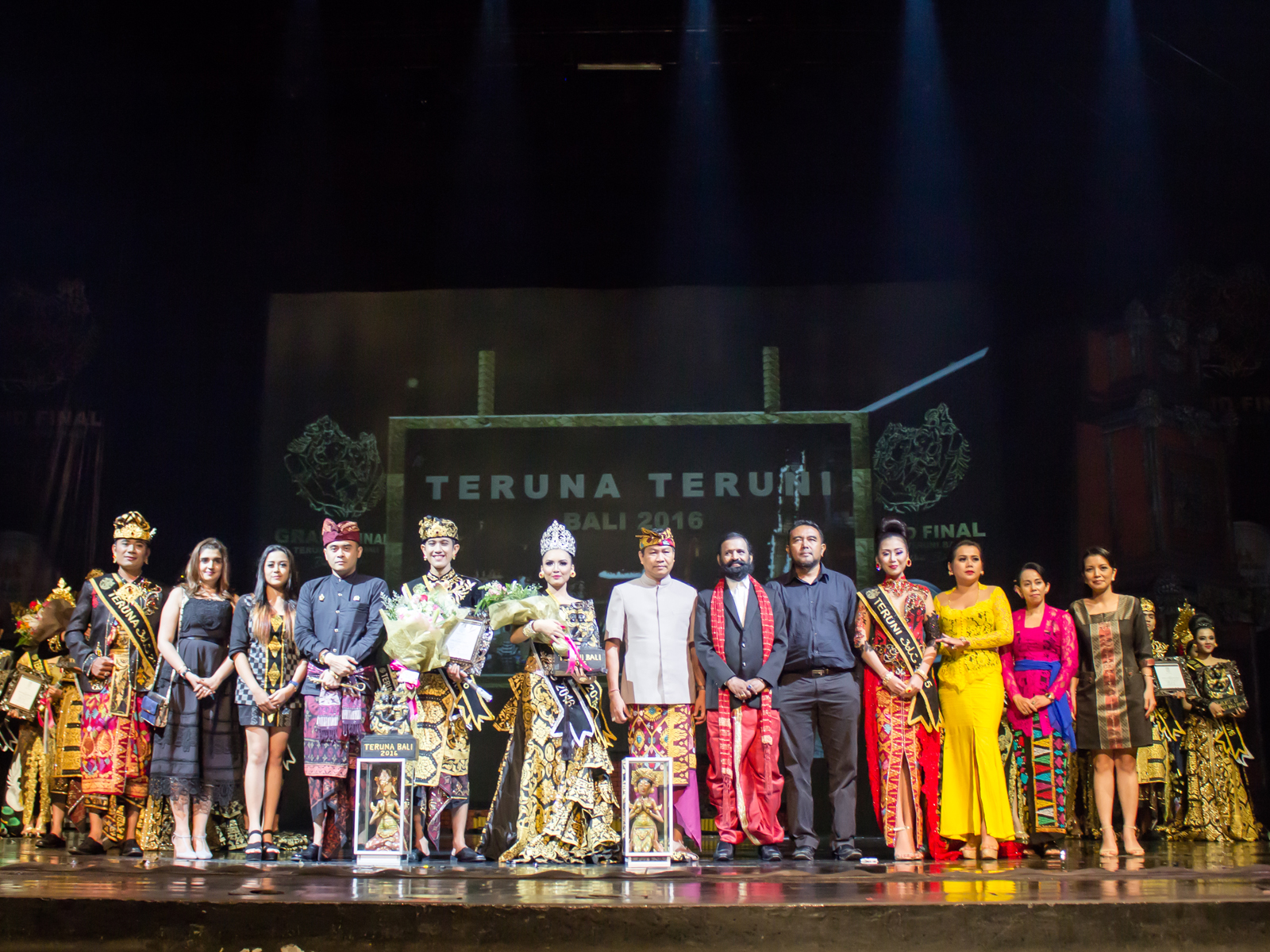 Teruna Teruni Bali adalah Duta Wisata Provinsi Pertama di Bali. Merupakan suatu ajang pemilihan muda dan mudi berprestasi yang siap mengemban misi selama satu tahun untuk membantu memperomosikan Bali di Bidang Pariwisata dan Budaya serta menjadi Tokoh Teladan di Bali.